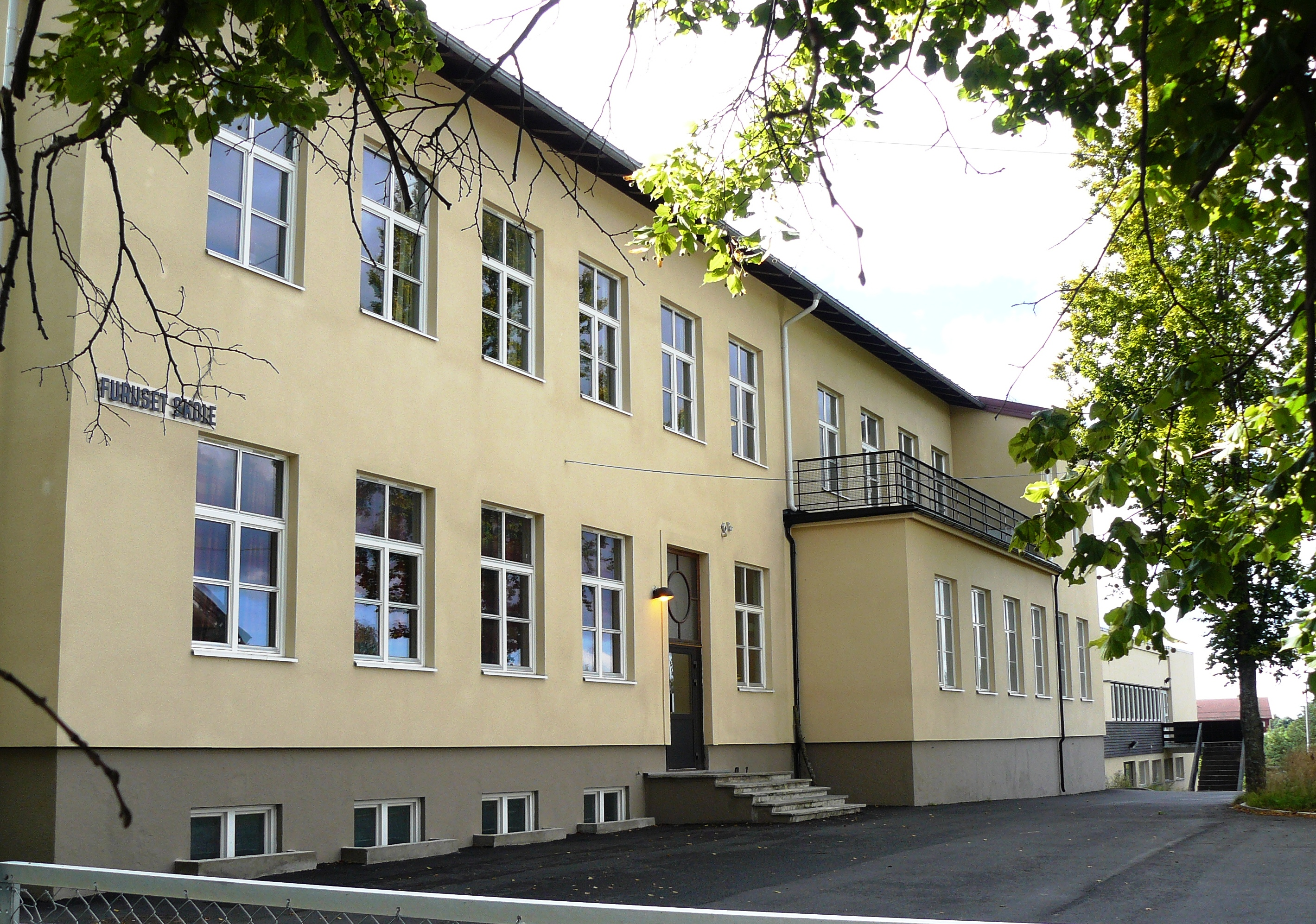 Furuset school, Oslo